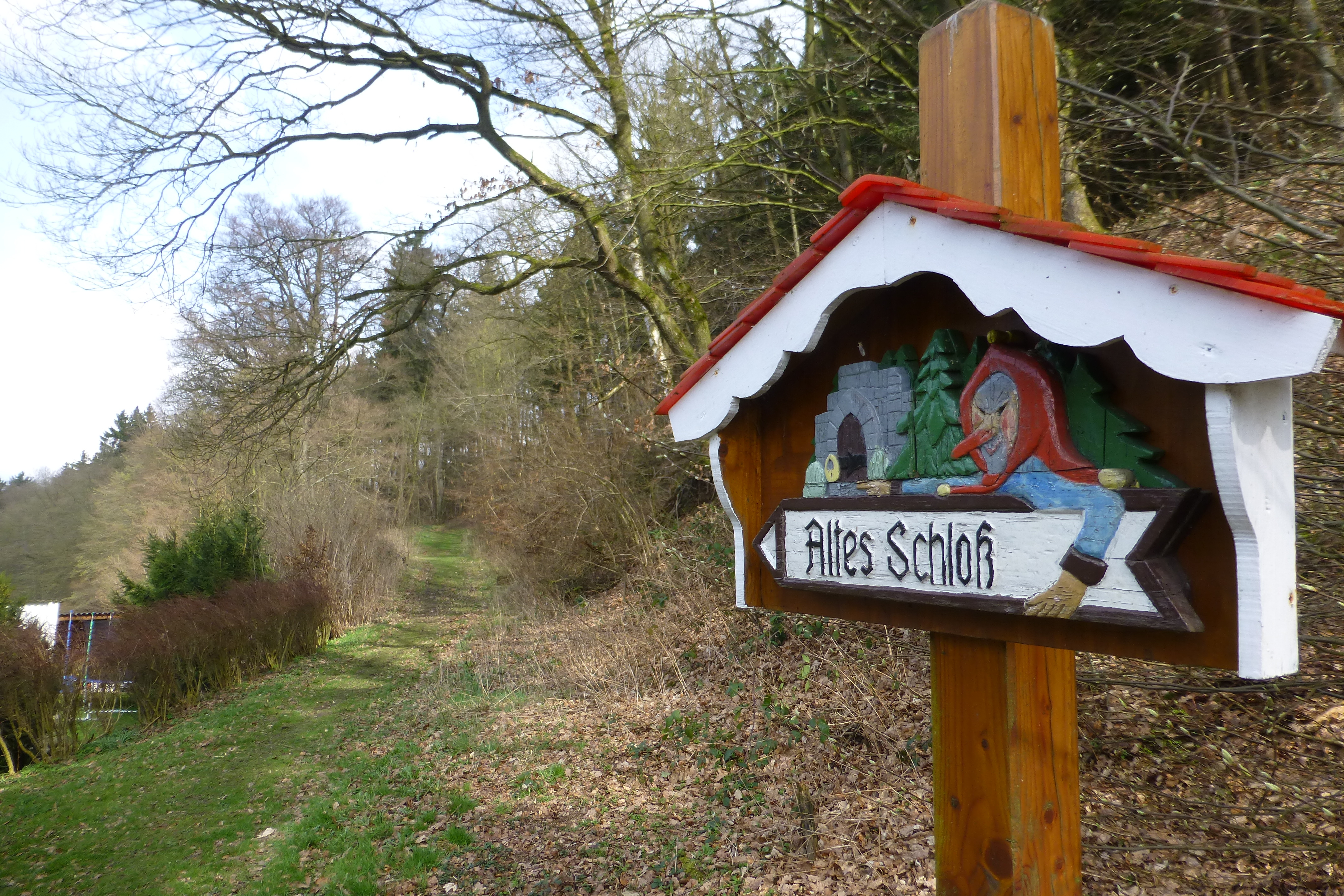 Touristischer Wegweiser und Wanderweg am Dorfrand von Ertinghausen zur Sehenswürdigkeit "Altes Schloss", Ertinghausen, Stadt Hardegsen, Landkreis Northeim, Südniedersachsen